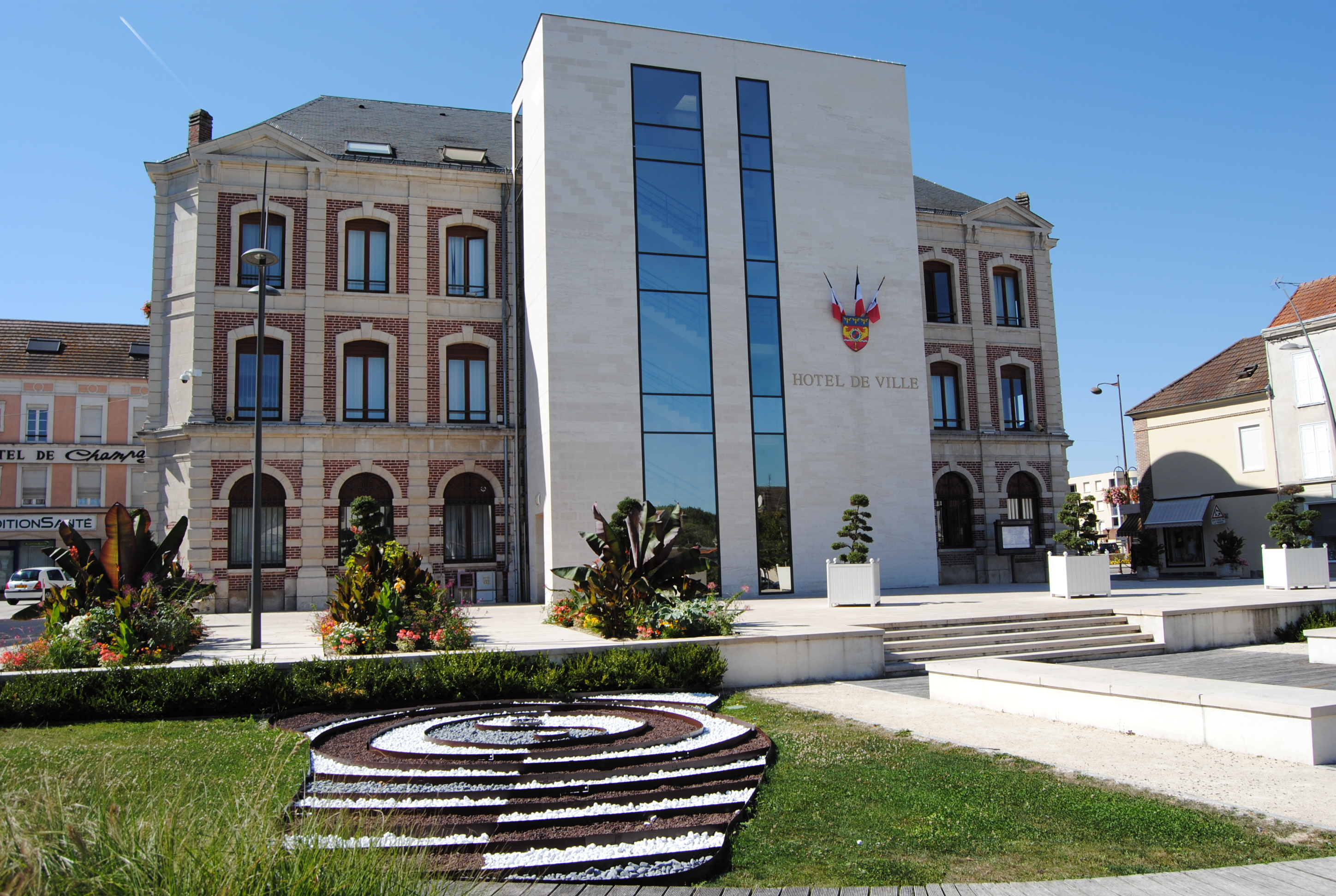 Le parvis de l'hôtel de ville de Romilly-sur-Seine